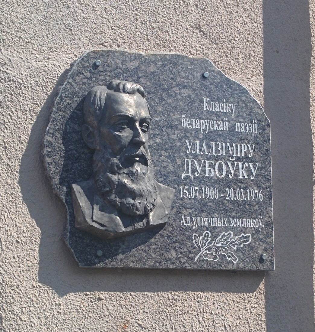 Дубоўка Уладзiмiр